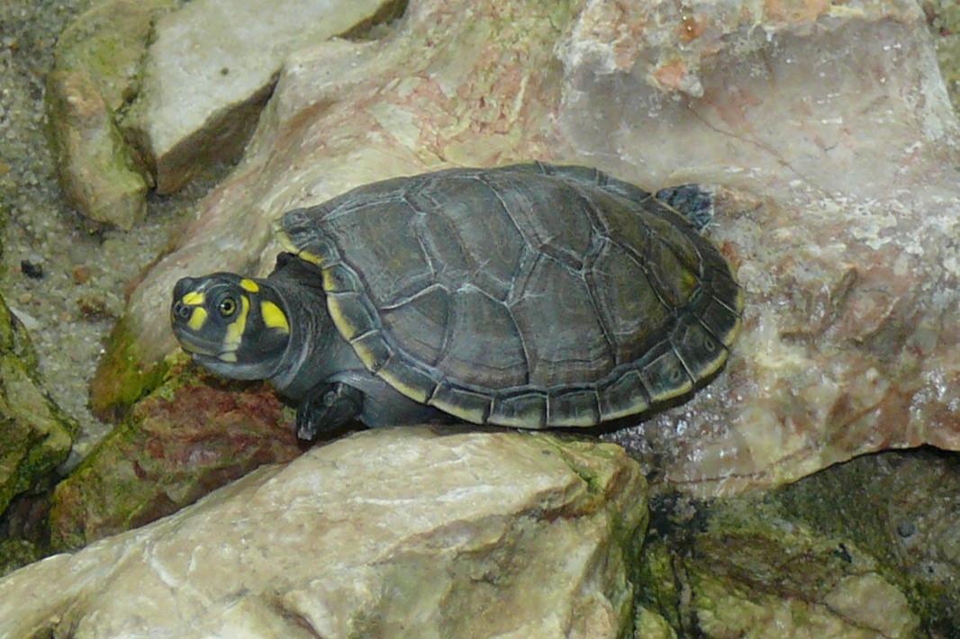 Podocnemis unifilis